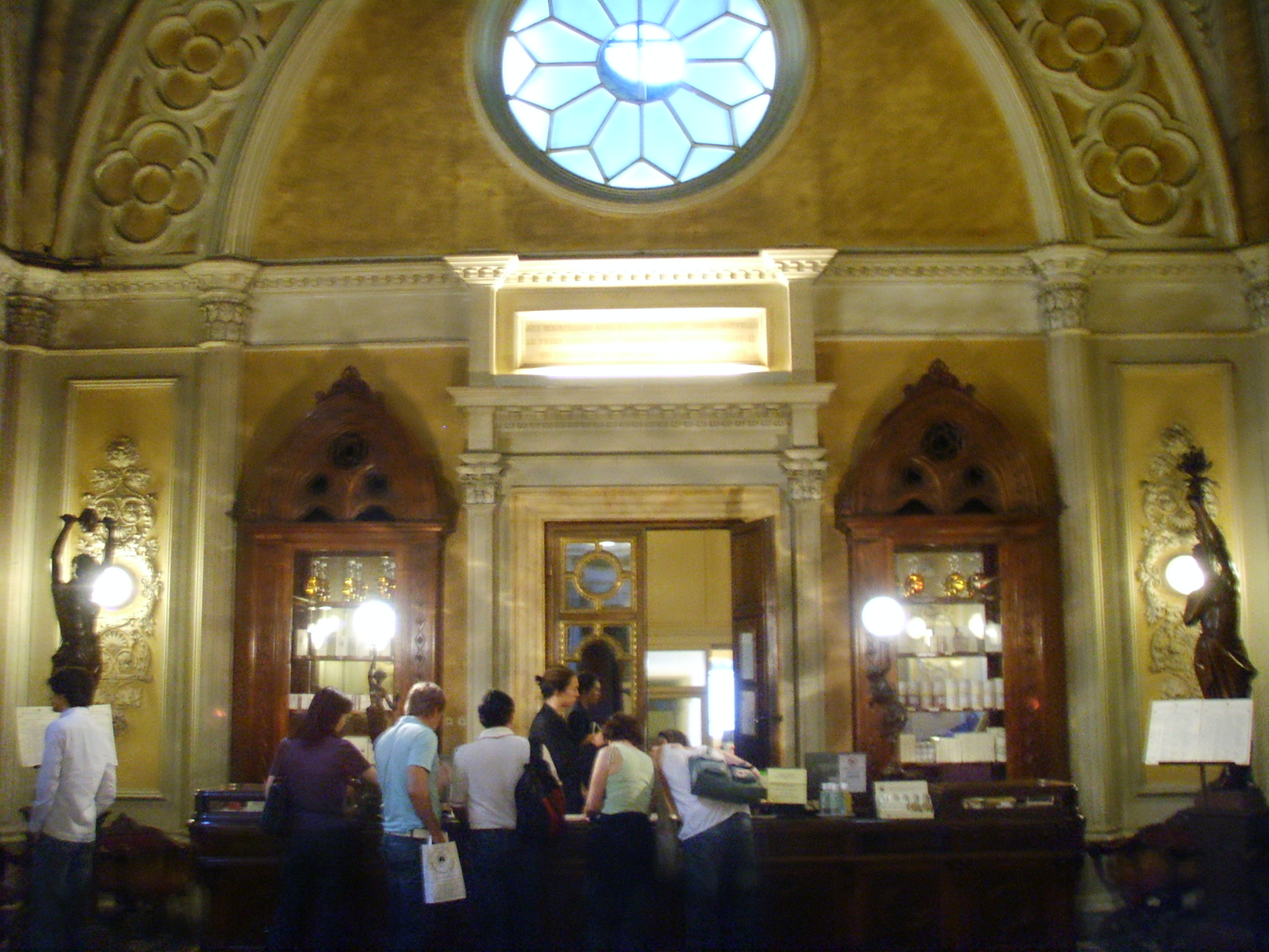 Officina_di_Santa_Maria_Novella, sala_di_vendita In Florence